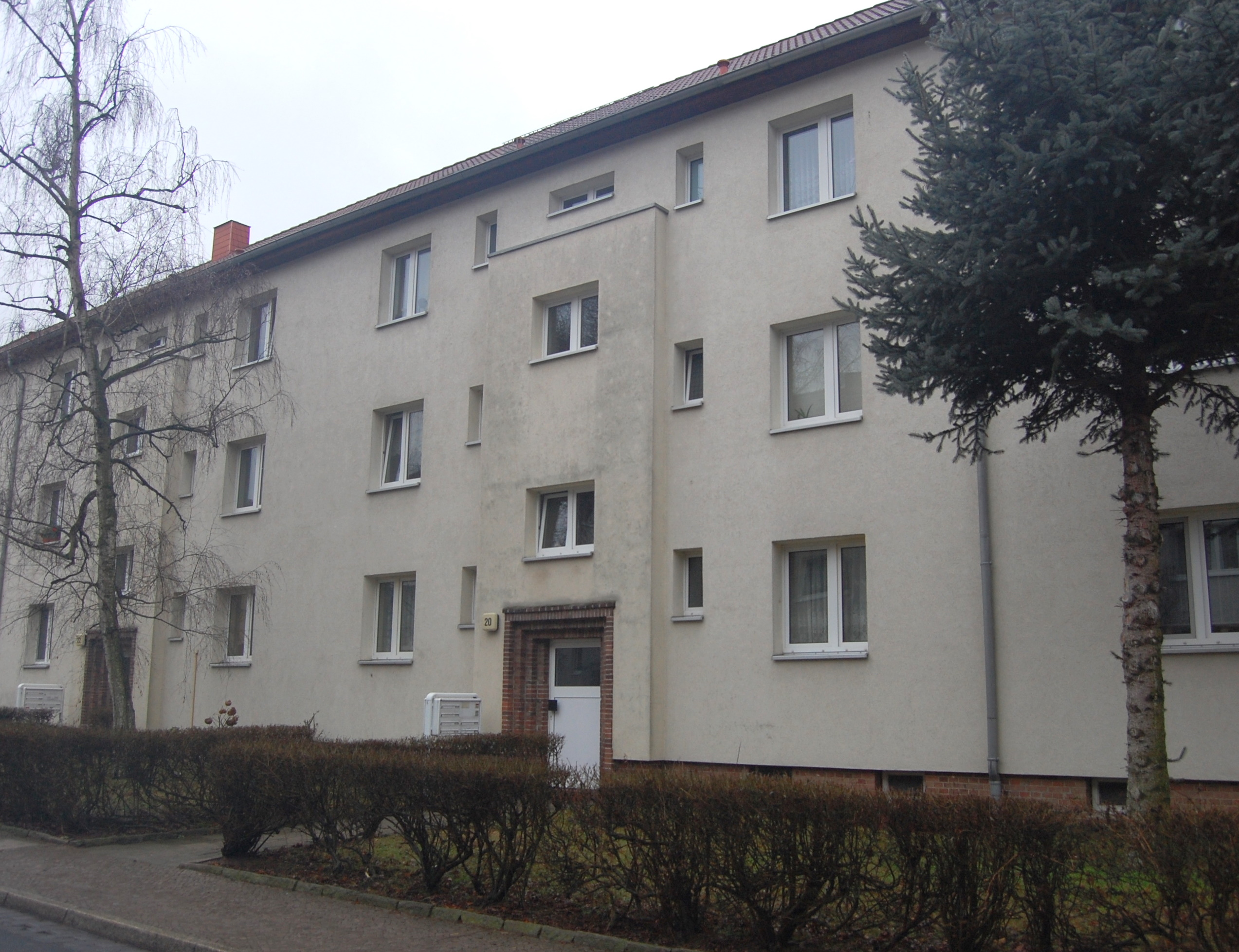 Haus Eggersdorfer Straße 20 in Magdeburg-Fermersleben